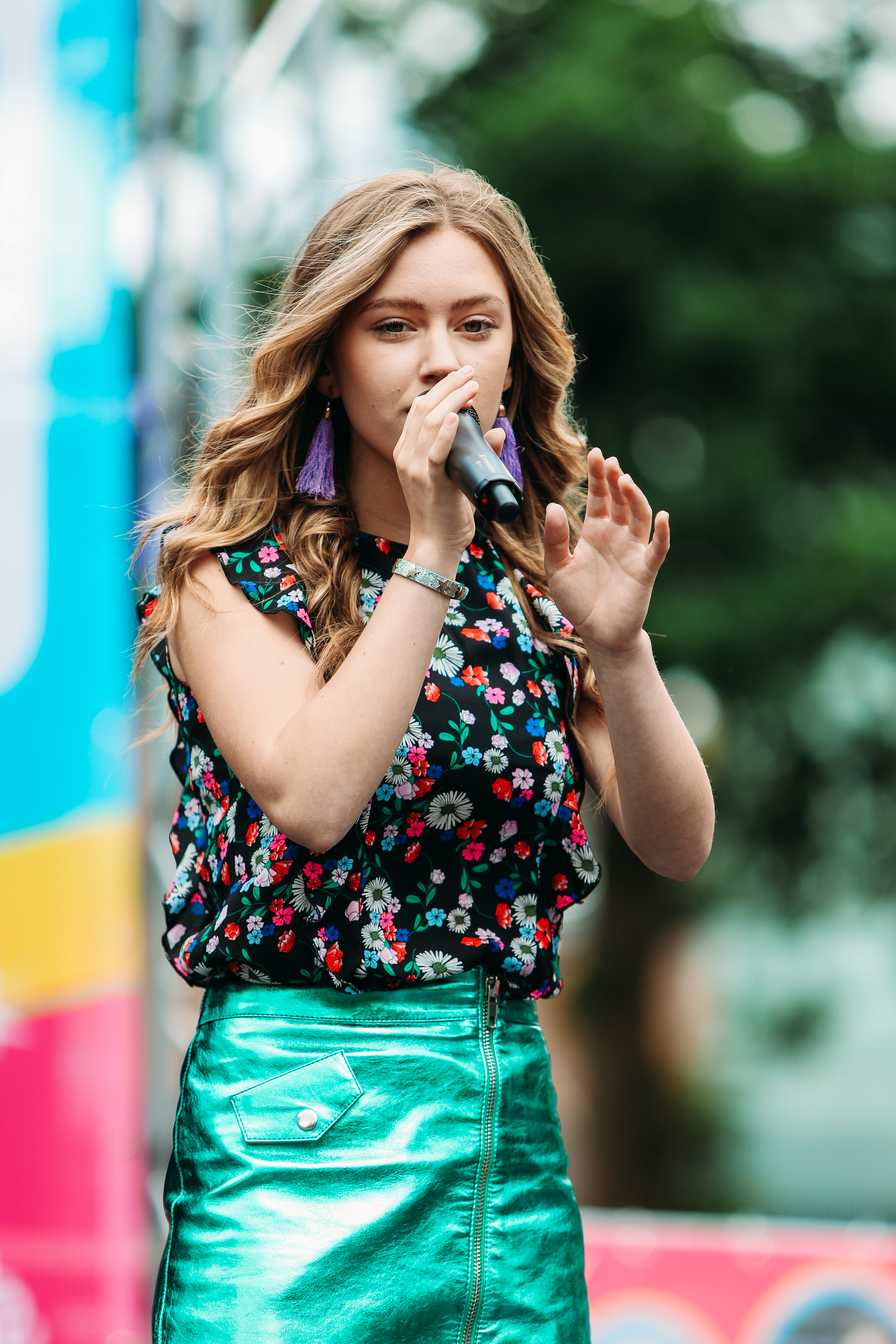 Sterre Koning tijdens Alles Kids in Drenthe (2019)